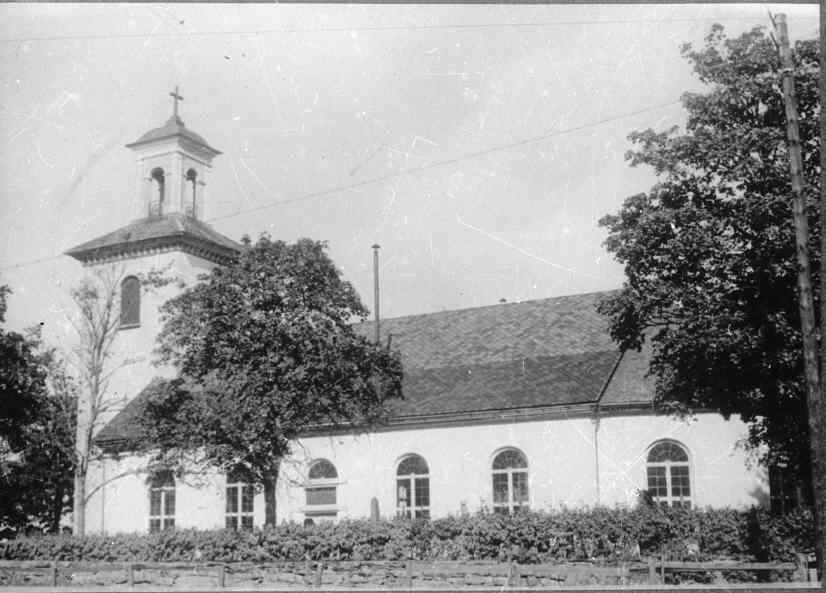 Kyrkan mot sydöst. Kategori: (01) ExteriörerKyrkan mot sydöst.